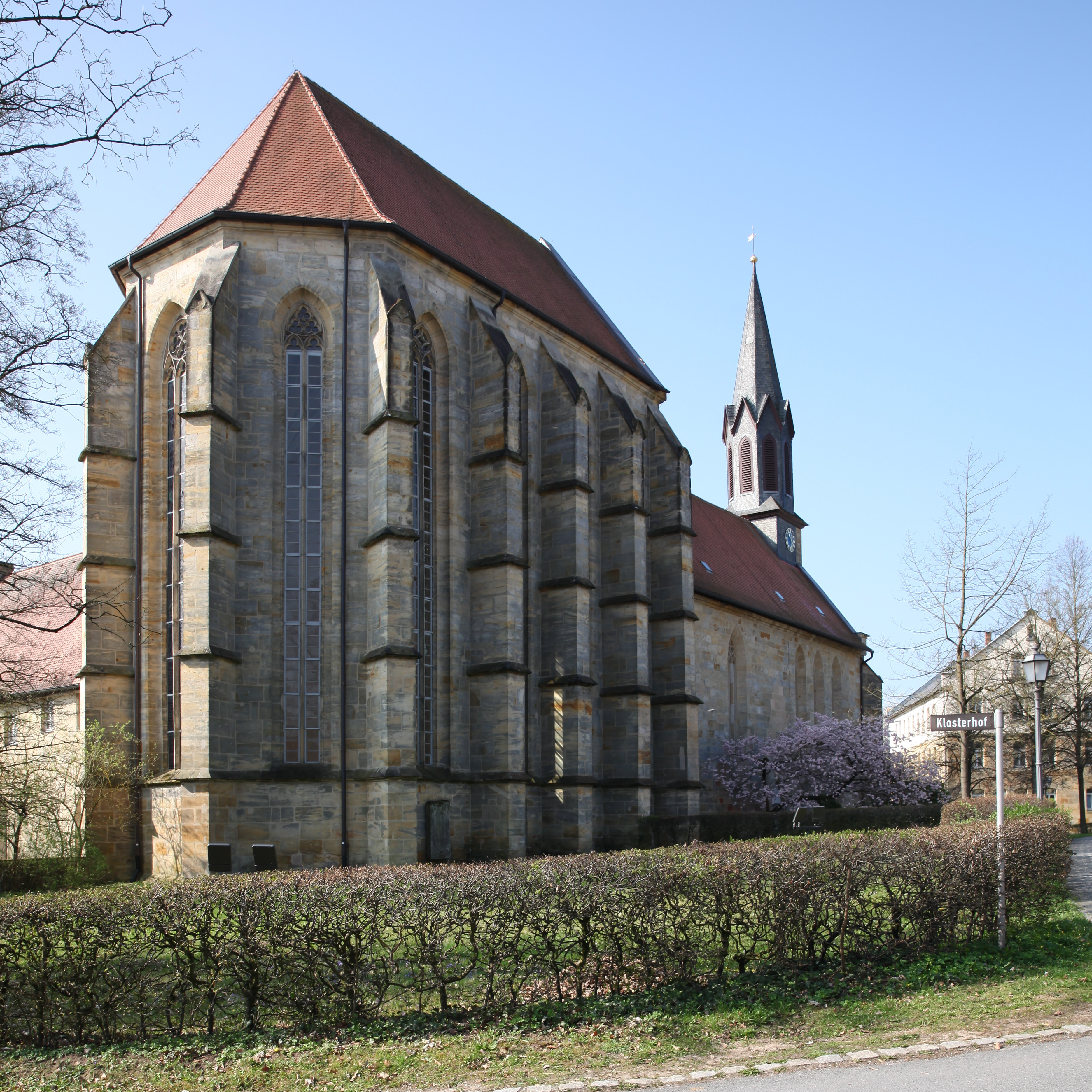 Klosterkirche in Sonnefeld, Landkreis Coburg